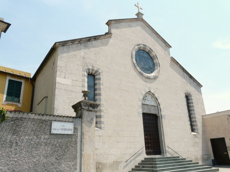 Chiesa della Santissima Annunziata di Sturla, Sturla, Genova, Liguria, Italia